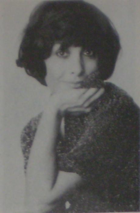 Thelma Biral